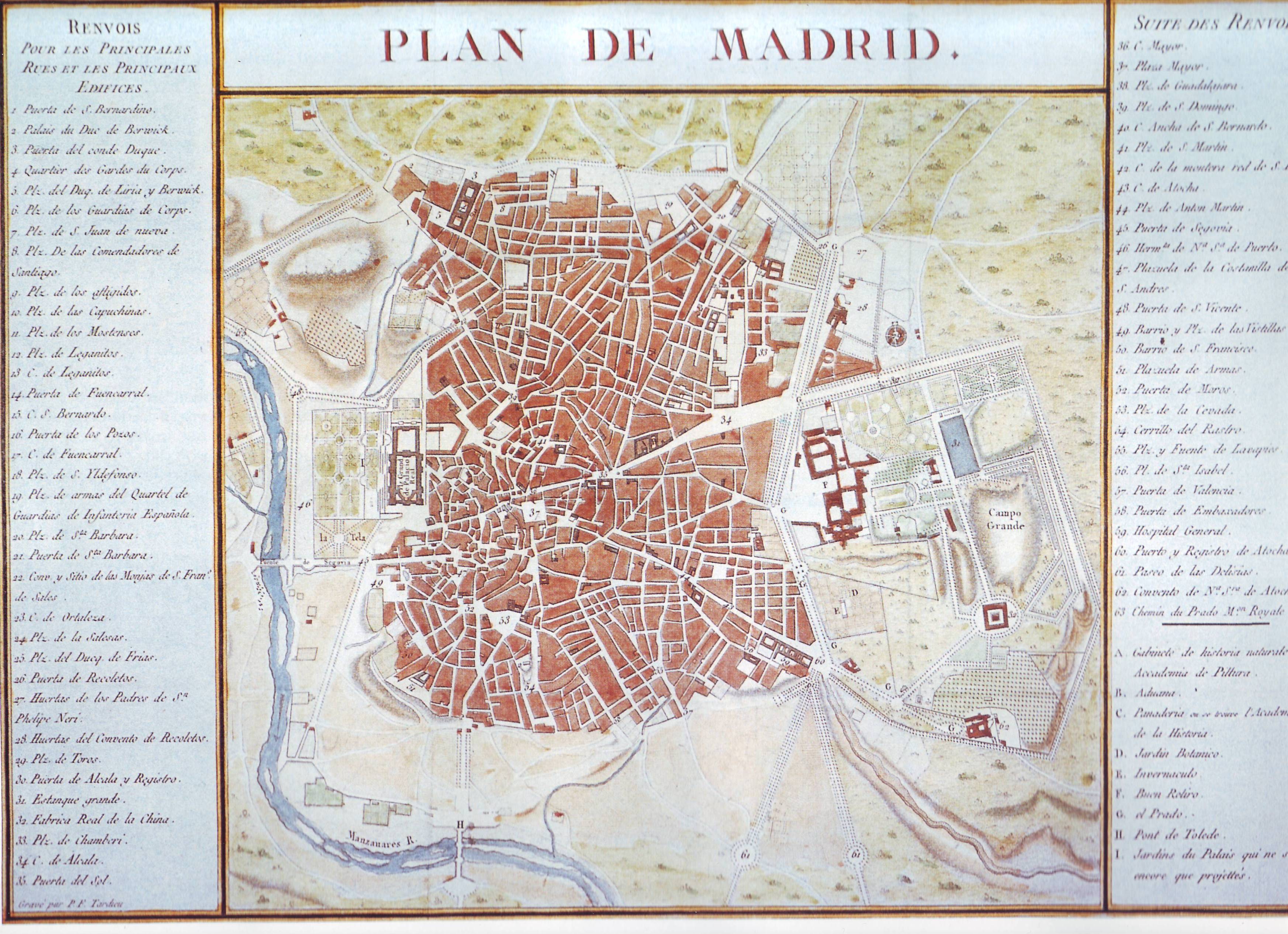 Mapa de Madrid del cartógrafo francés Tardieu, hacia 1780